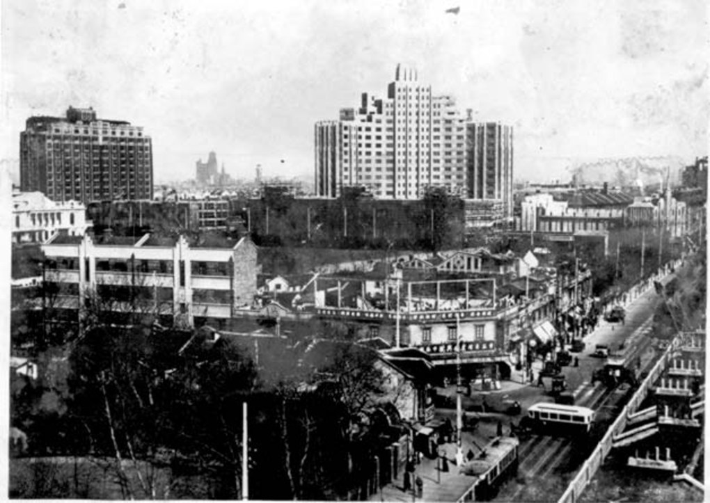 中文（中国大陆）: 淮海路和锦江饭店旧景